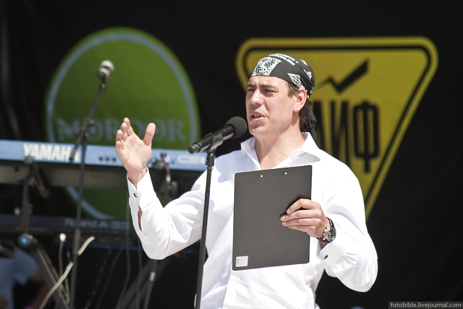 Дмитрий Дюжев, ведущий фестиваля "Рок над Волгой 2010"